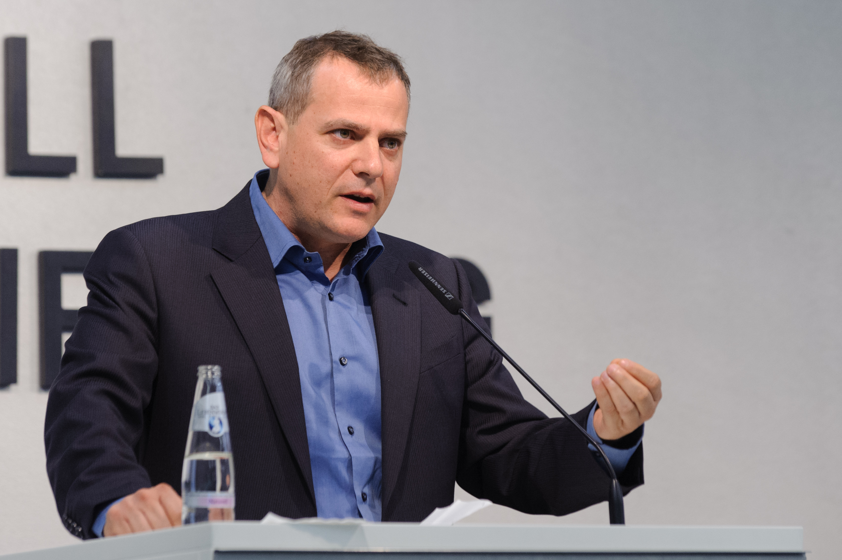 Nitzan Horowitz (Journalist, Knesset-Abgeordneter New Movement Meretz) Konferenz: Fremde Freunde?